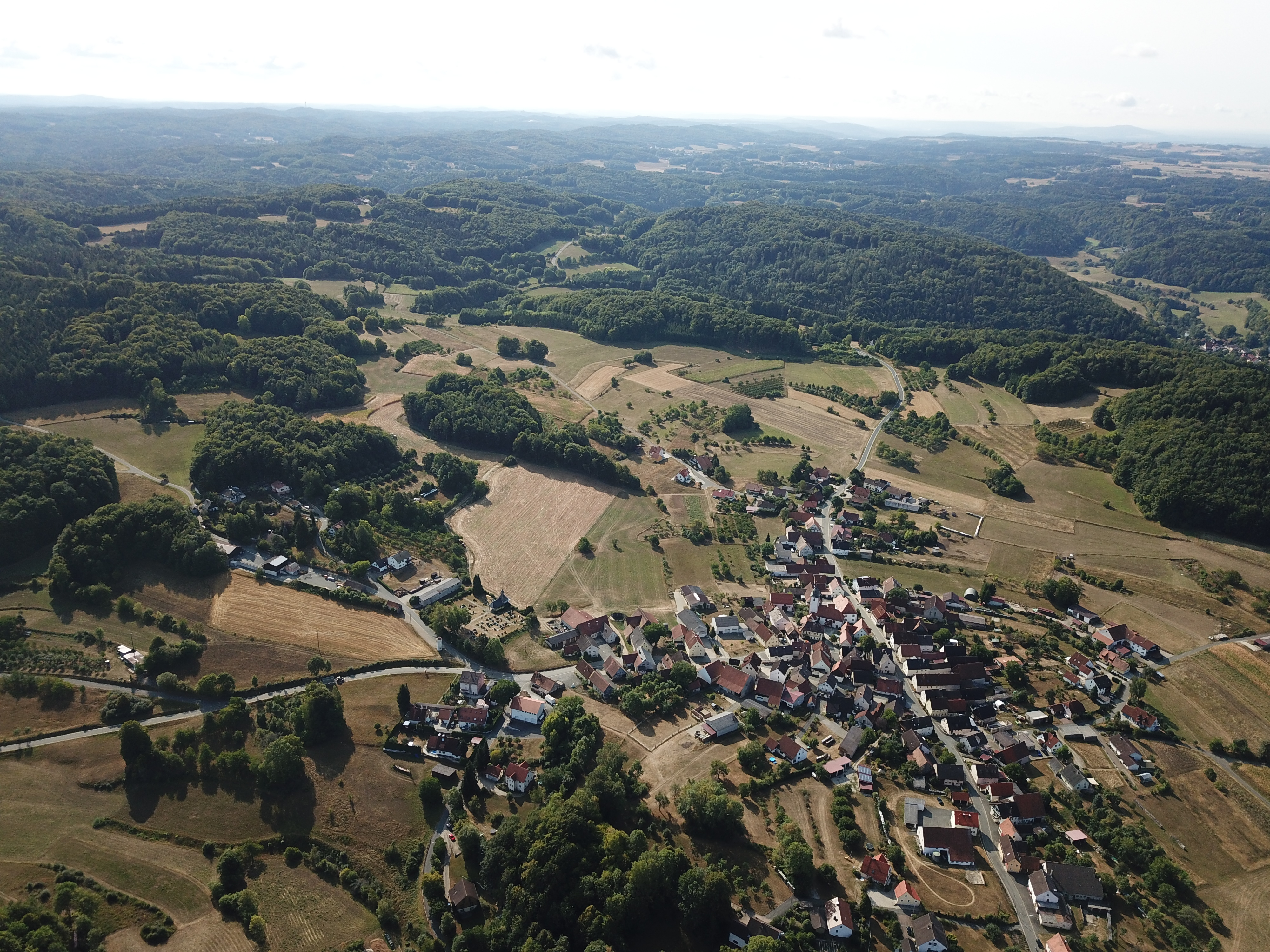 Blick auf Affalterthal (ohne Brunnleite)